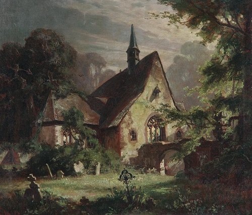 Kapelle im Mondschein. Öl auf Leinwand, 46 x 55,5 cm., Signiert und datiert unten links »F. v. W. 12«, signiert unten rechts »A. v. W. 7 (...)«